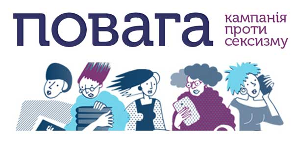 Логотип сайту кампанії проти сесксизу "Повага"